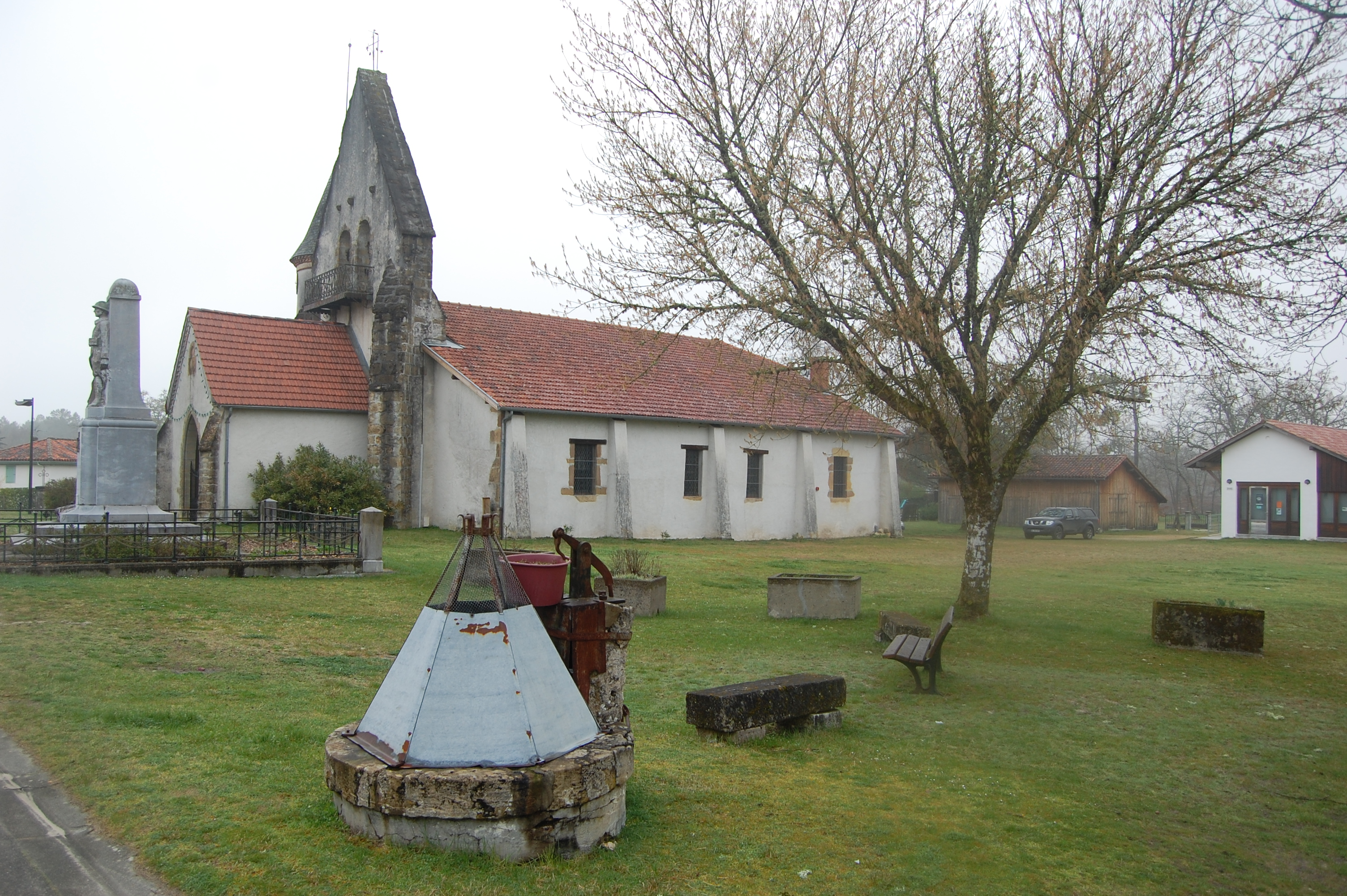 Puits et église de Vert.